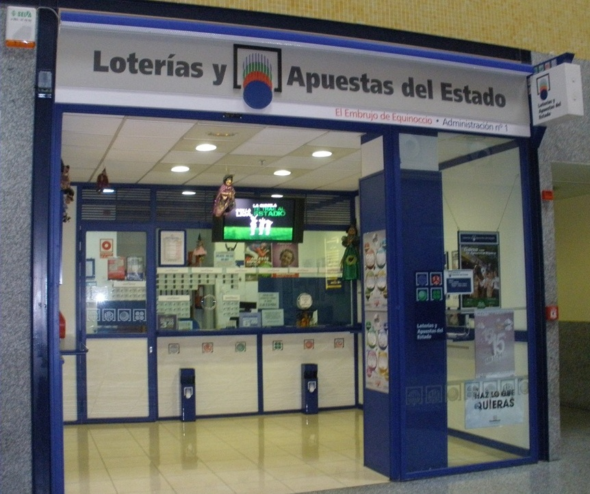 Administración de loterías